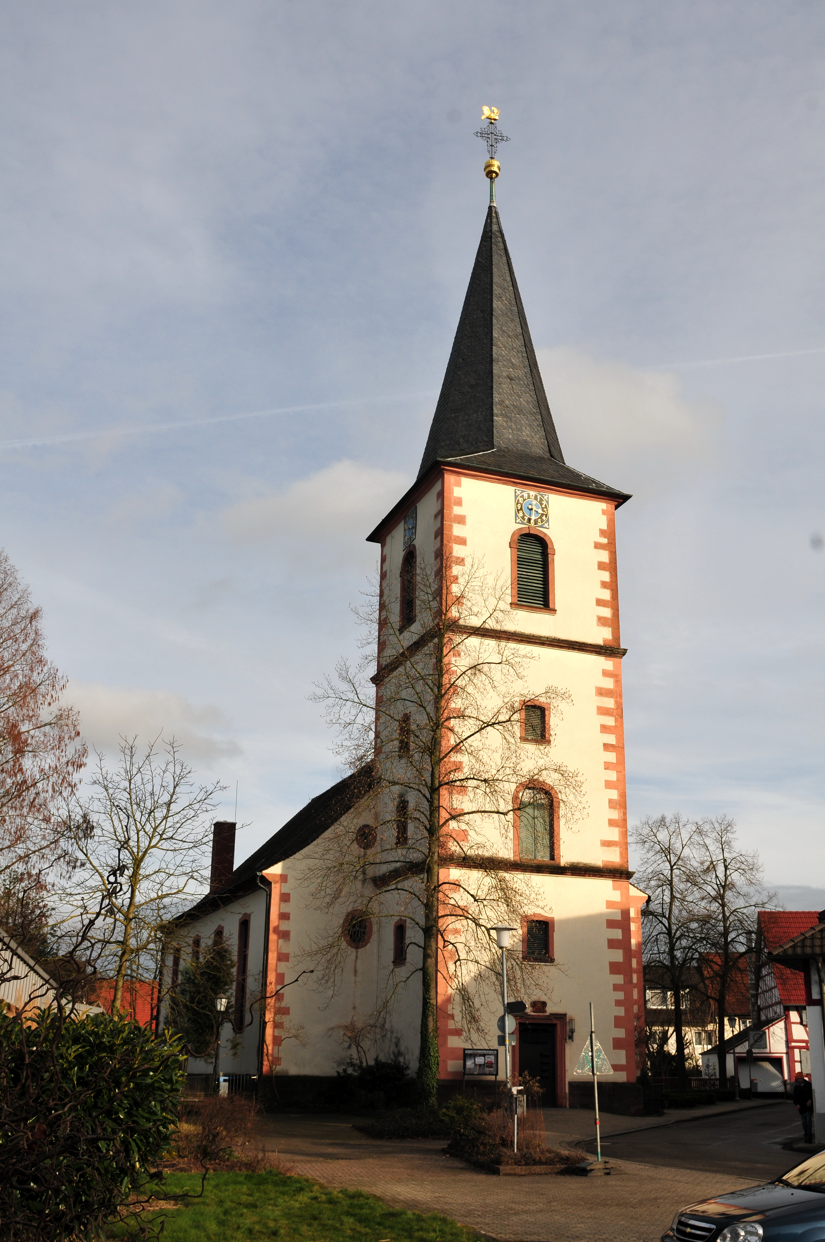 Evangelische Dorfkirche, Kork (Kehl) European Parliament 2014 3.–7. February 2014, StrasbourgThis photo has been created within the project "WIKI loves parliaments / European Parliament". Usage and Help If you have any questions concerning this picture or how to use it, feel free to